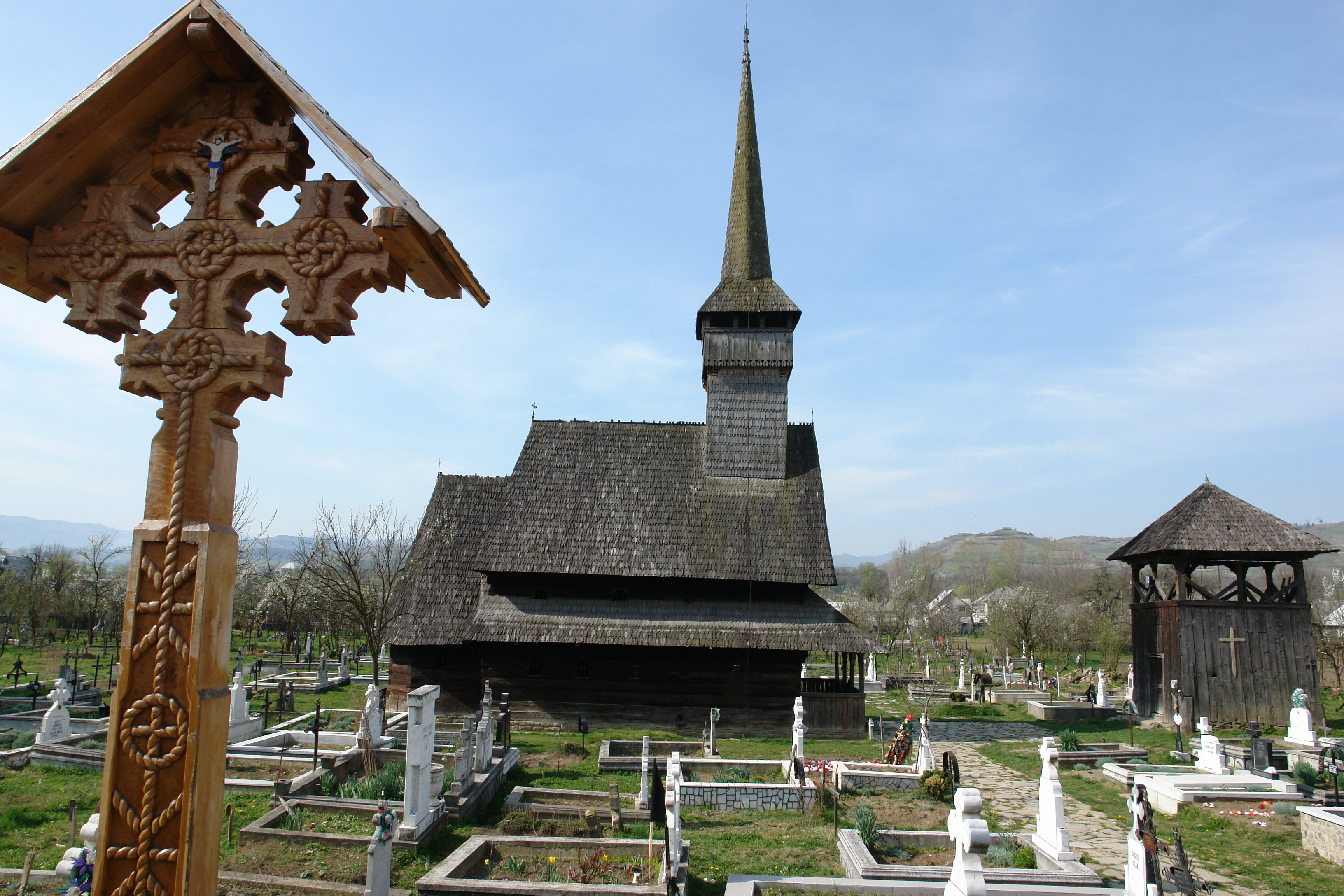 Rozália fatemploma - Máramaros